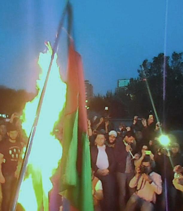 Ադրբեջանի և Թուրքիայի դրոշների այրումը Ազատության հրապարակում, 23.04.2016